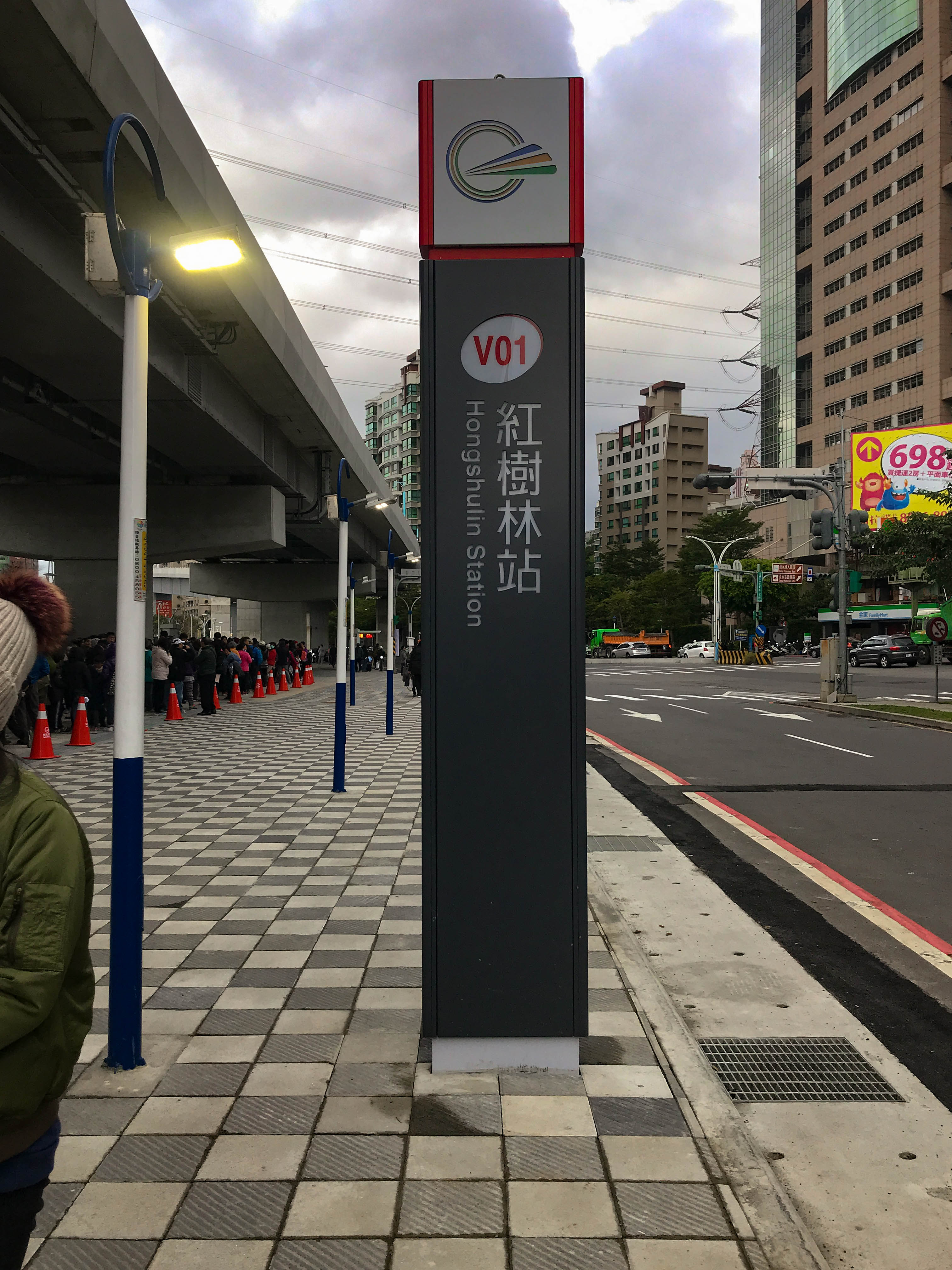 中文（台灣）: 新北捷運淡海輕軌綠山線紅樹林站直立式站名牌